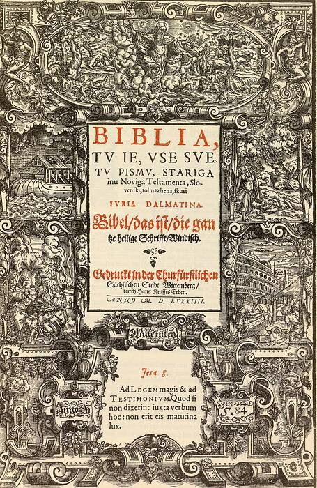 Dalmatinova Biblija.